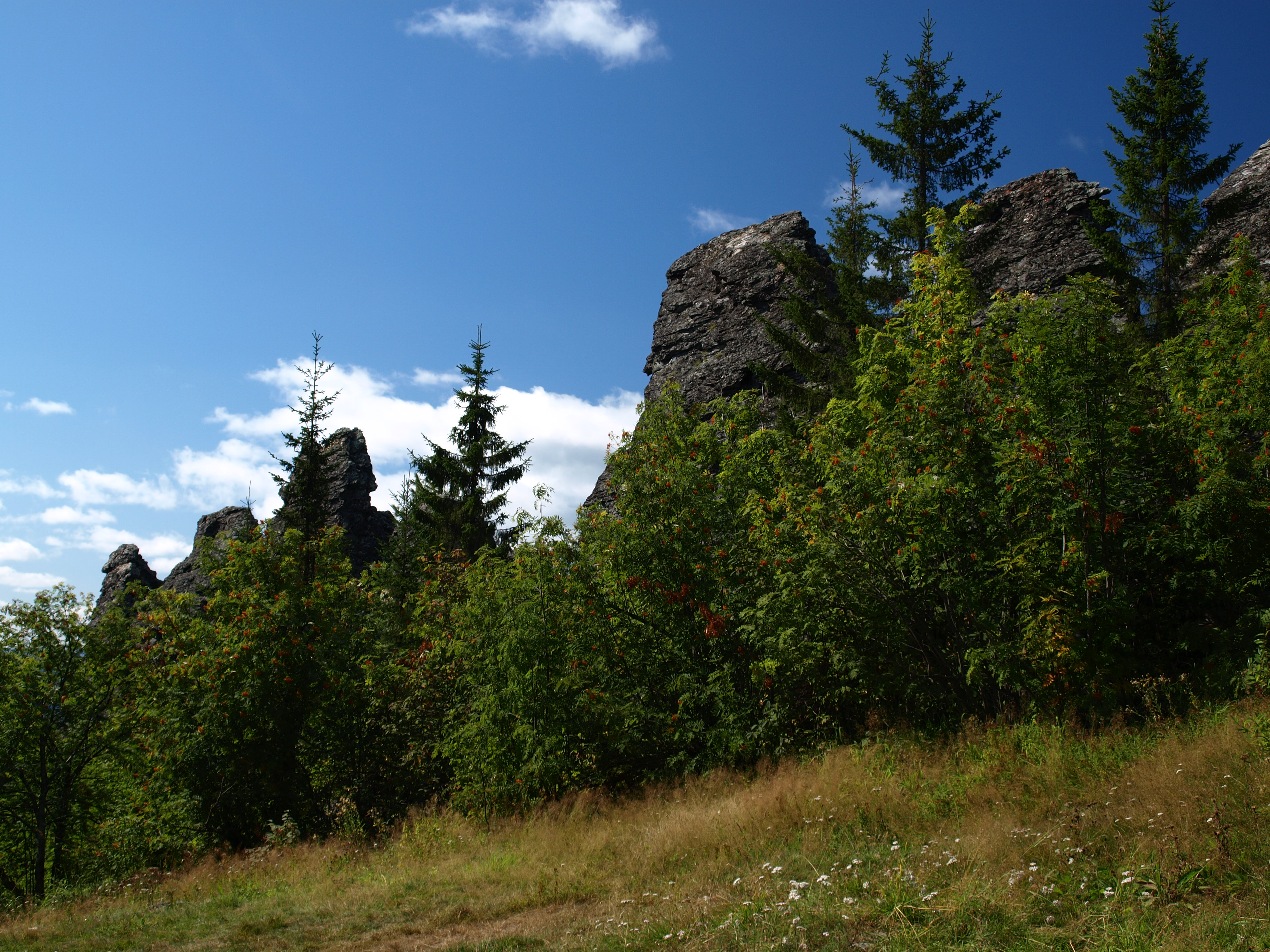 Колпаки, Горнозаводский район This image is related to the protected area of Russia number 5910057